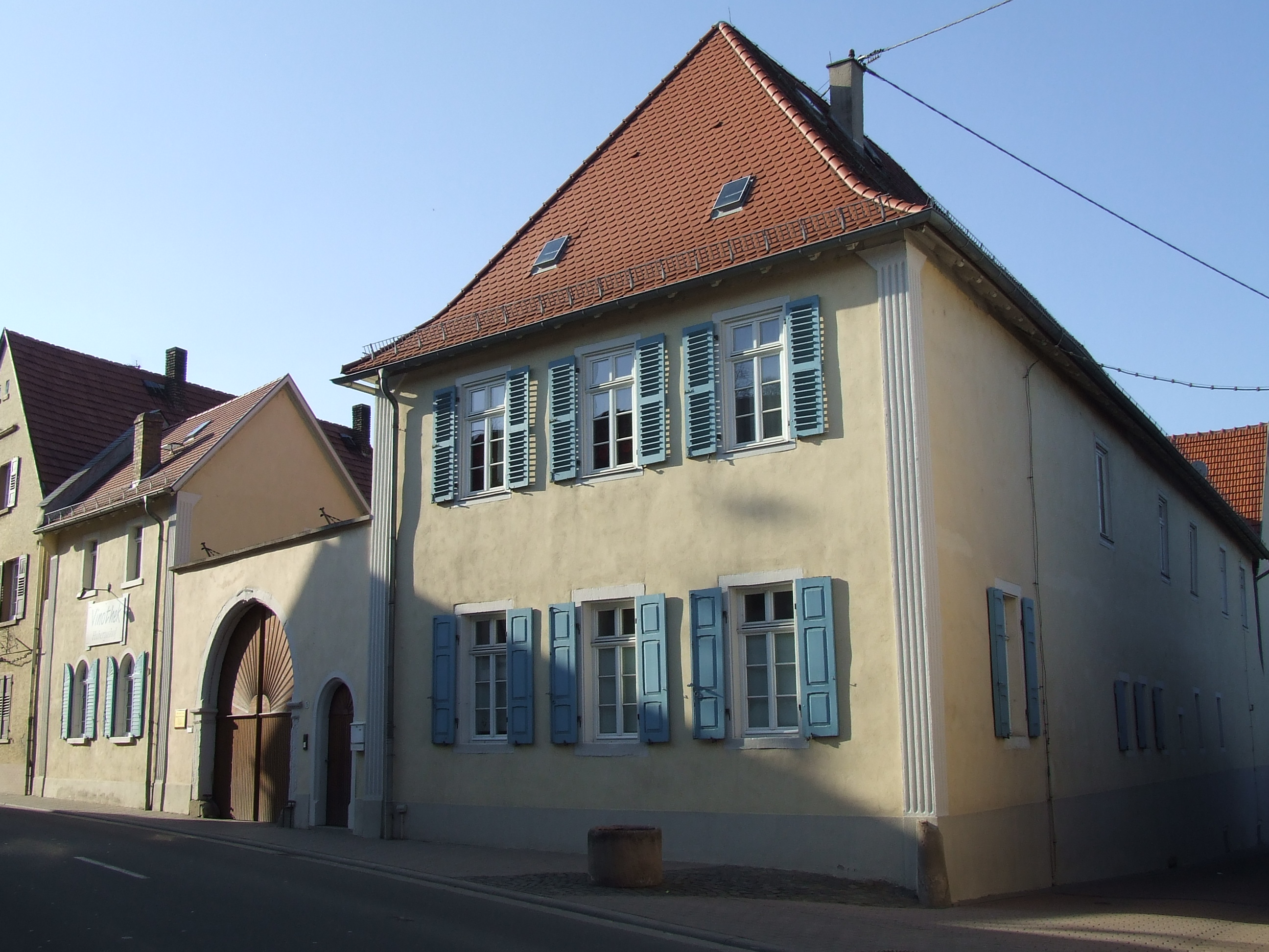 Vereinigte Weingüter Krebs-Grode, hier die Vinothek Hupertushof in Gau-Odernheim